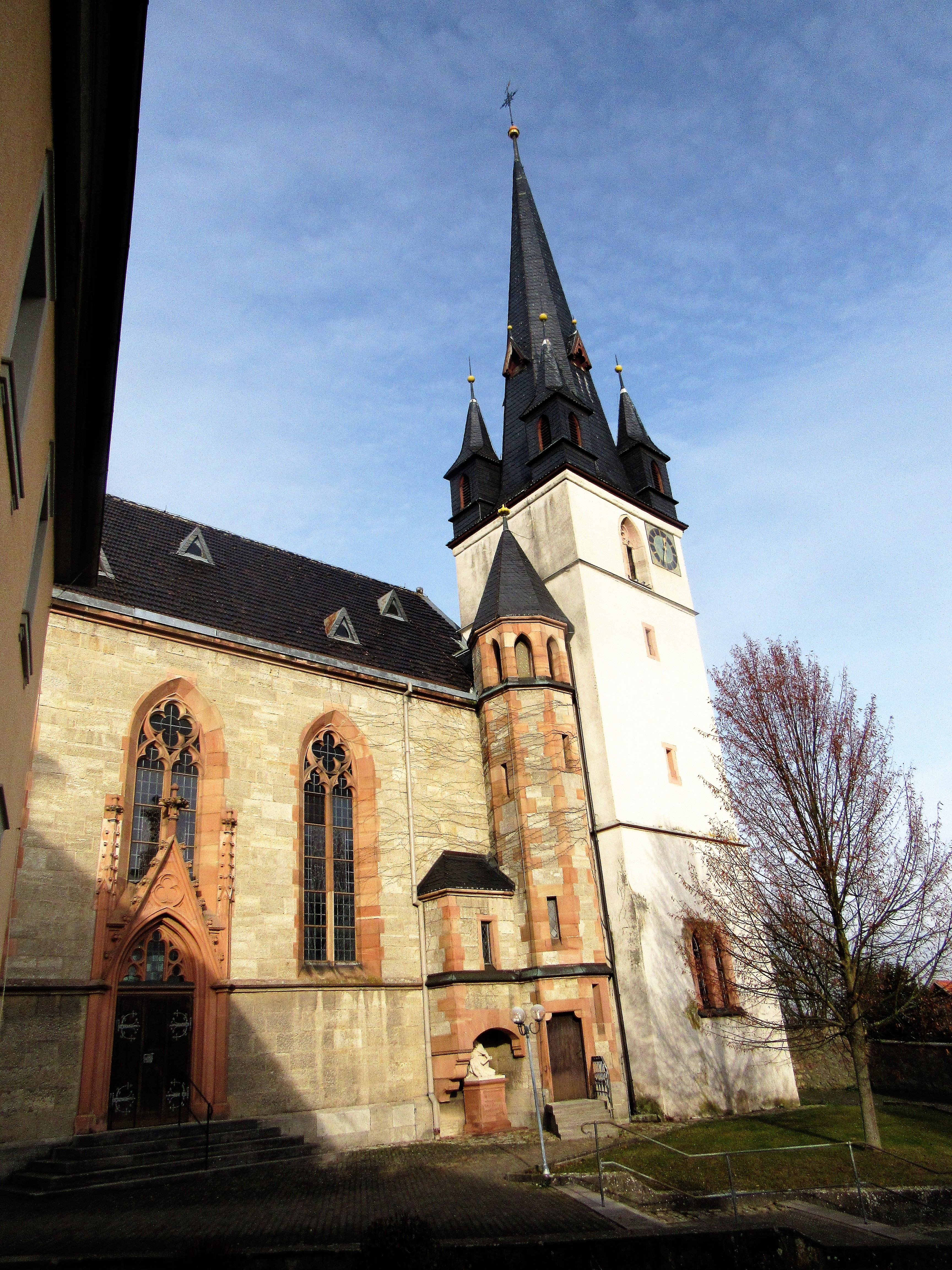 Kirche St. Katharina in Niederlauer